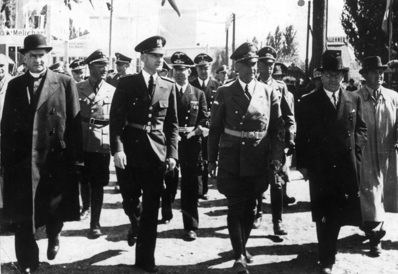 Pressekonferenz zu Globke in Prag und Berlin Auf einer Pressekonferenz des Verbandes antifaschistischer Widerstandskämpfer unterbreitete der Historiker Dr. Kral der Öffentlichkeit Dokumente über die Vergangenheit des nazistischen Judenmörders und heutigen Bonner Staatssekretärs Globke, die seine Verantwortung für Naziverbrechen gegen das tschechoslowakische Volk beweisen.- Auf einer internationalen Pressekonferenz in Berlin am gleichen Tage übergab der Außerordentliche und Bevollmächtigte Botschafter der CSSR in der DDR, Otto Klicka, der Öffentlichkeit neues belastendes Material gegen Globke. UBz: Auf den Pressekonferenzen wurden der Öffentlichkeit Dokumente übergeben, die Globkes faschistische Vergangenheit eindeutig beweisen. Dazu gehört u.a. dieses Foto, das Globke (2. Reihe Mitte) in Bratislava zeigt. Er weilte im September 1941 in der Slowakei und bereitete zusammen mit Nazi-Innenminister Frick (1. Reihe 3.v. links) die Einführung des berüchtigten Judenkodexes vor.